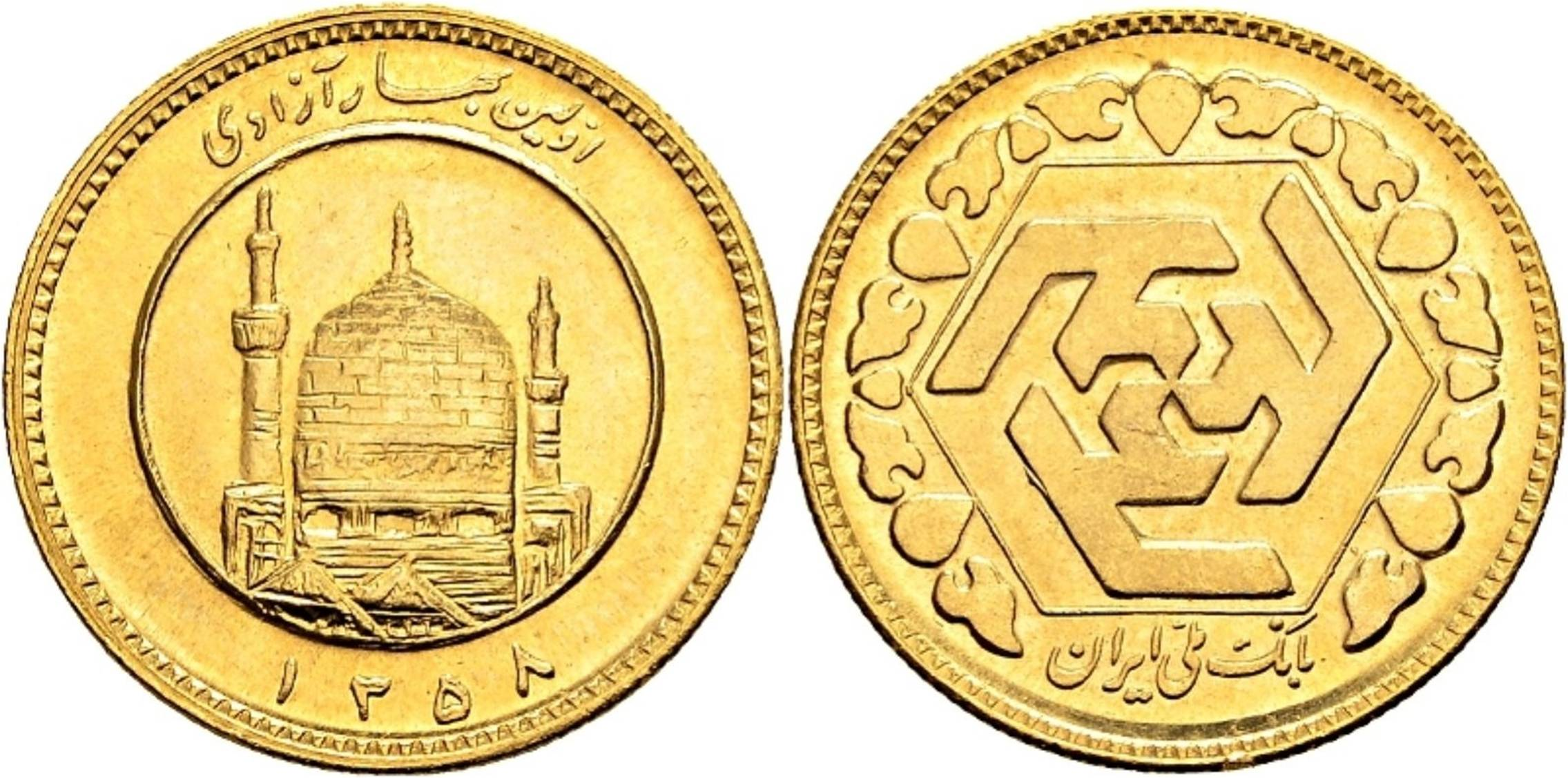 نخستین سکه بهار آزادی که در سال 1358 خورشیدی ضرب شد.